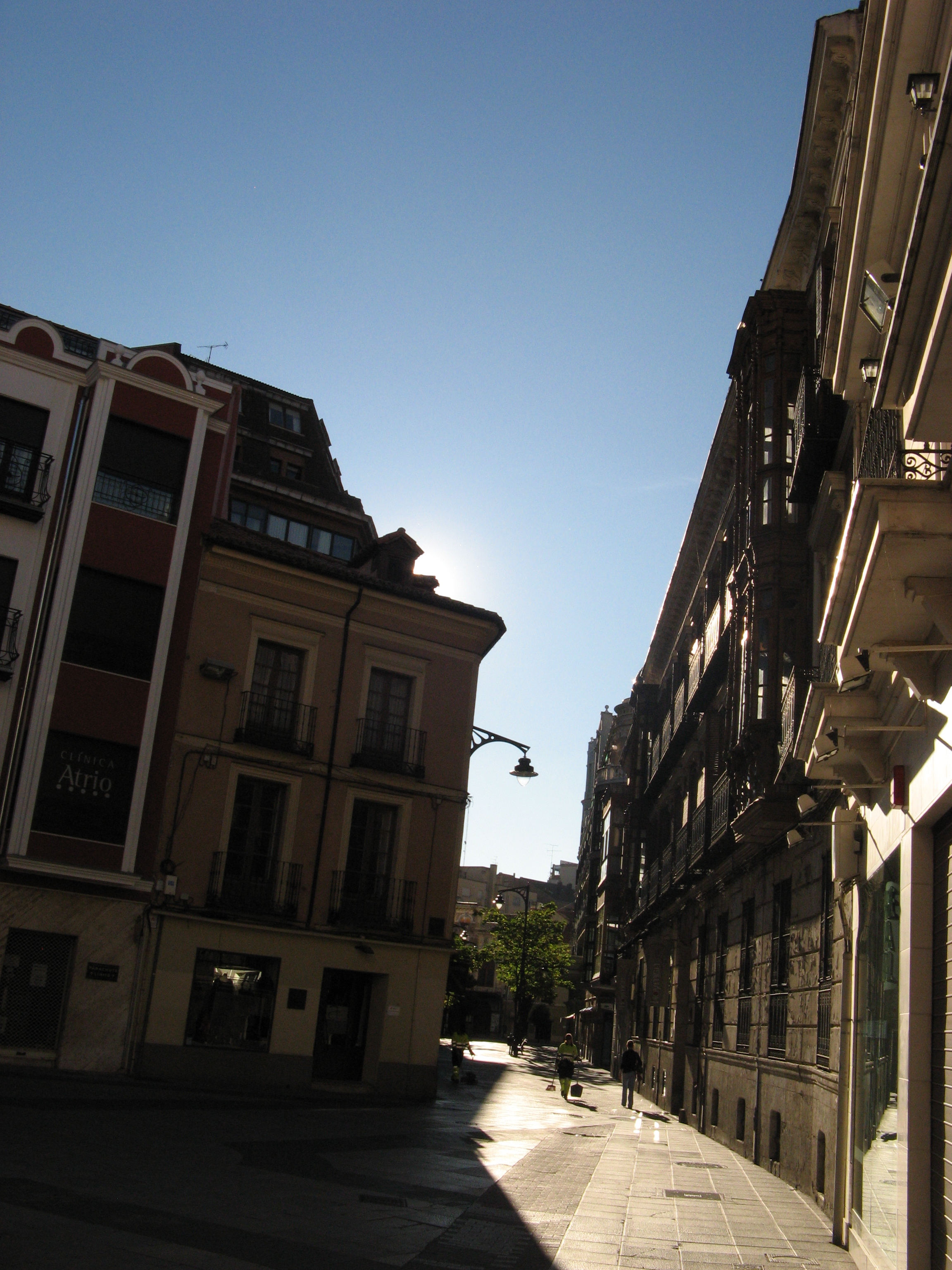 Calle de los Héroes del Alcázar (actual calle de los Héroes de Alcántara).